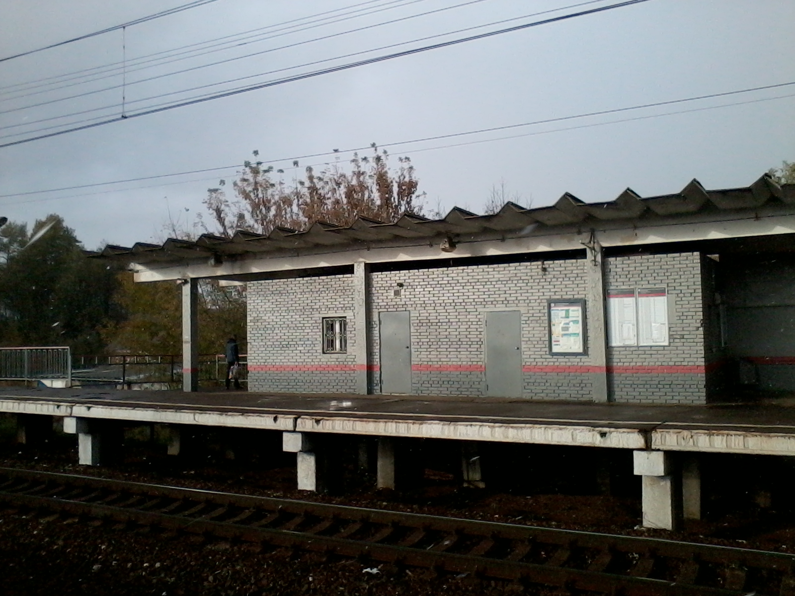 Платформа Соколовская (Ярославское направление МЖД)